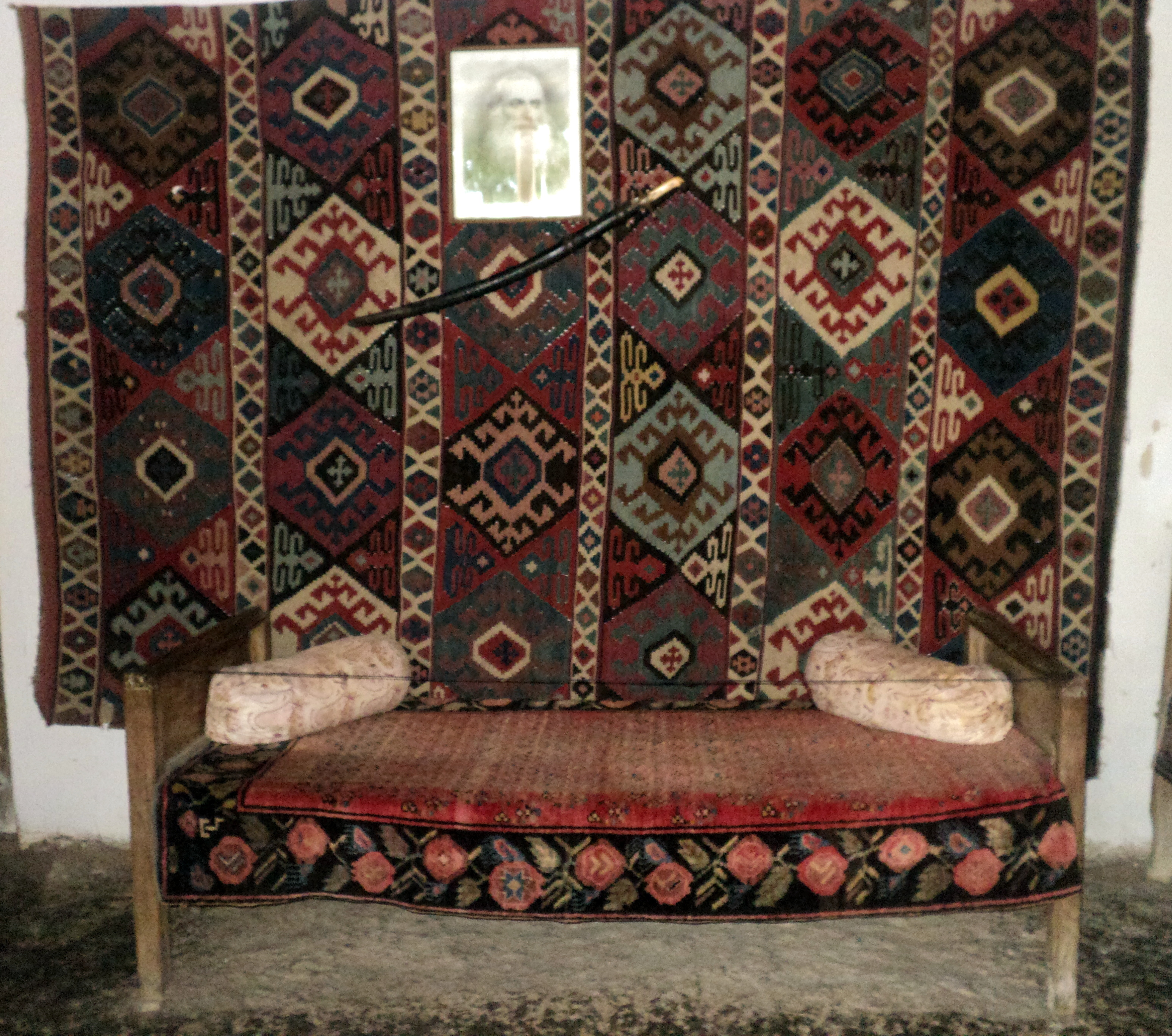 Հովհաննես Թումանյանի տուն-թանգարան, Դսեղ